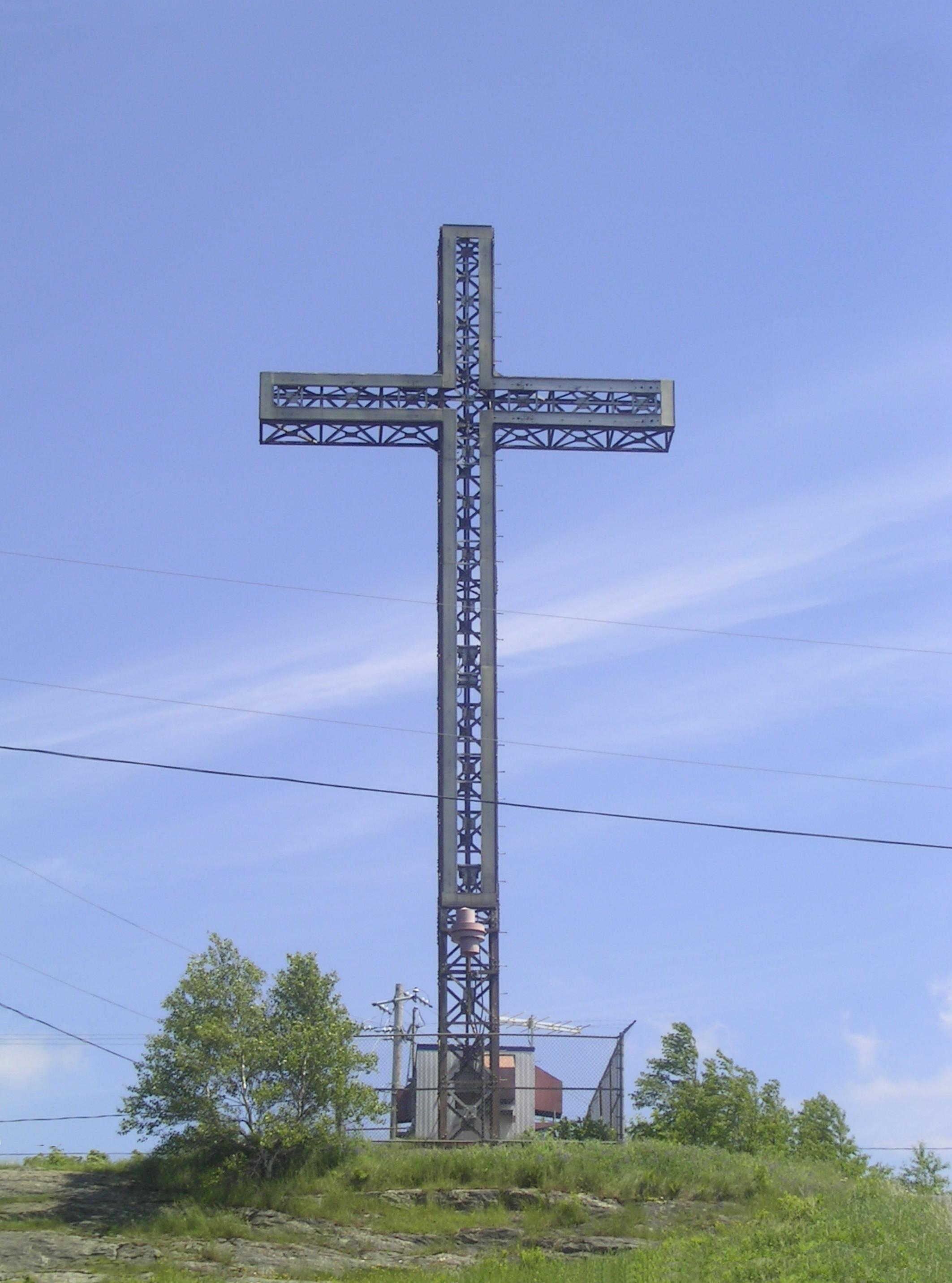 Photo de la Croix sur le mont Arthabaska. J'ai prise cette photo moi-même avec mon appareil photo. Alors Libre de droit. J'autorise que l'on publie cette photo.